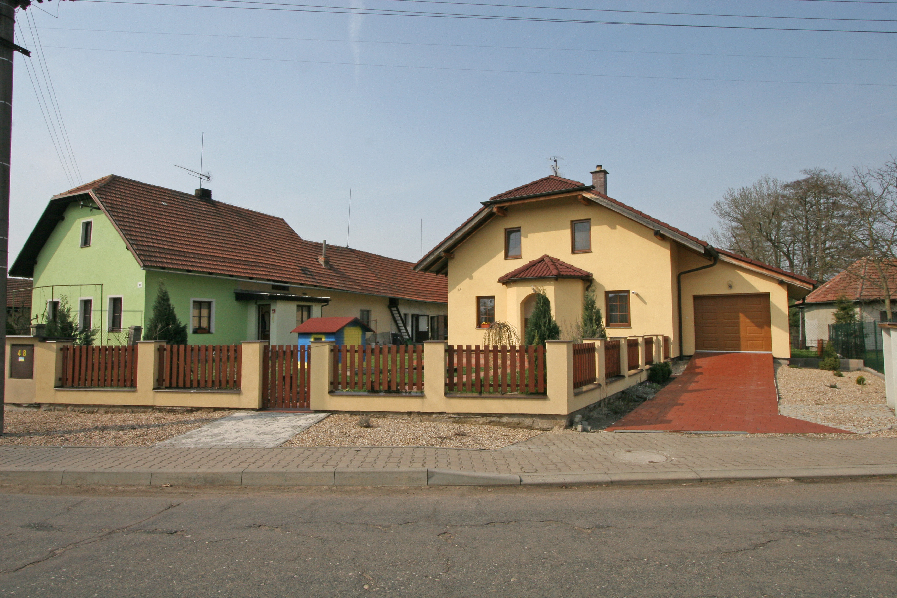 Přepychy čp. 48